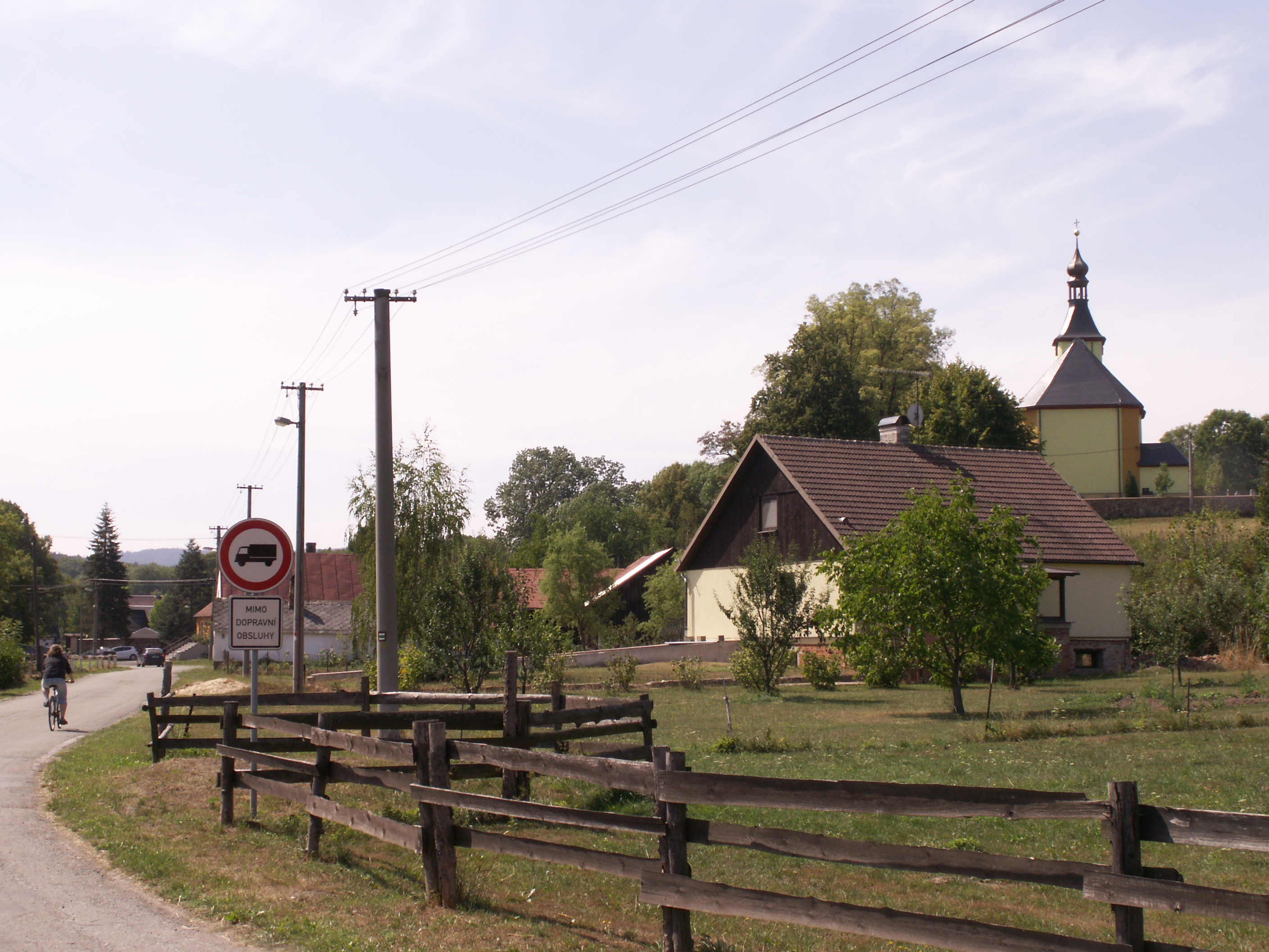 Pitárné, část obce Vysoká, okres Bruntál, kraj Moravskoslezský